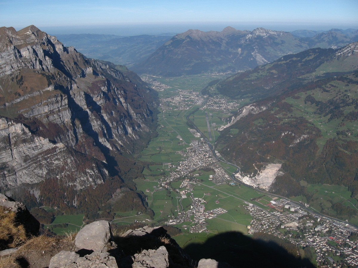 Vom Vorderglärnisch nach Norden; Glarus rechts unten, Netstal, Mollis/Näfels und Niederurnen, links des Tals Rautispitz und Wiggis